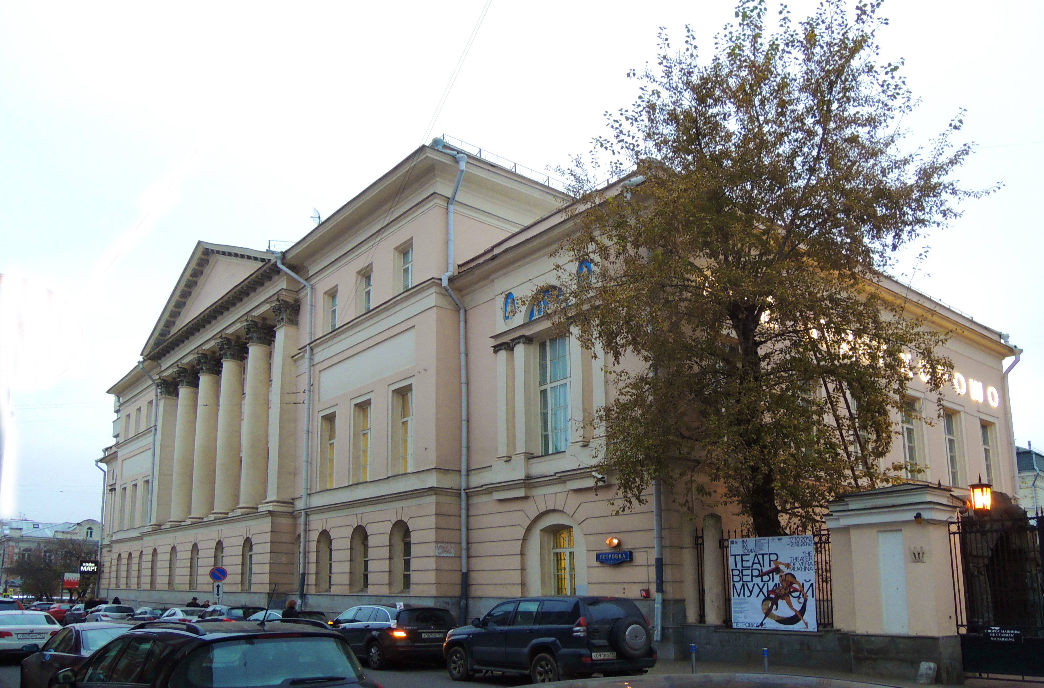 Особняк Губина — ампирный особняк в Москве, ныне — одно из зданий Московского музея современного искусства (Петровка, 25).